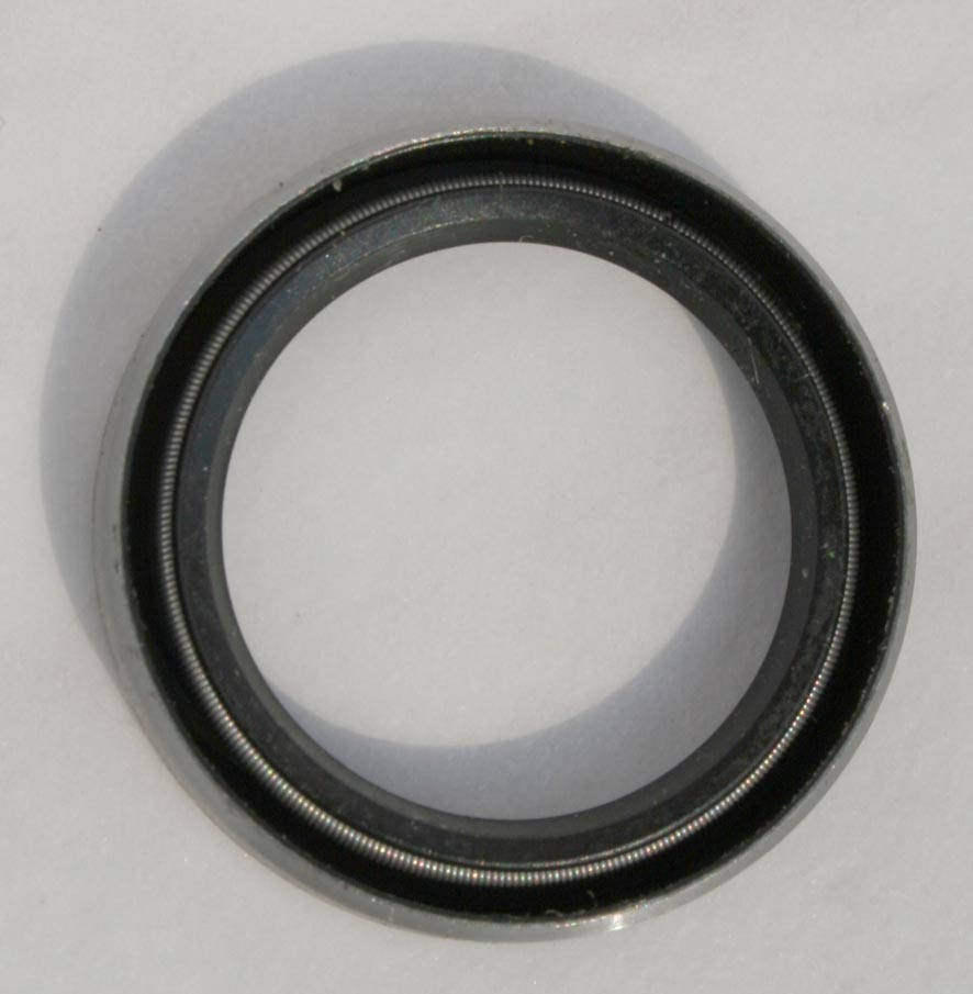 Wellendichtungsring mit Wurmfeder